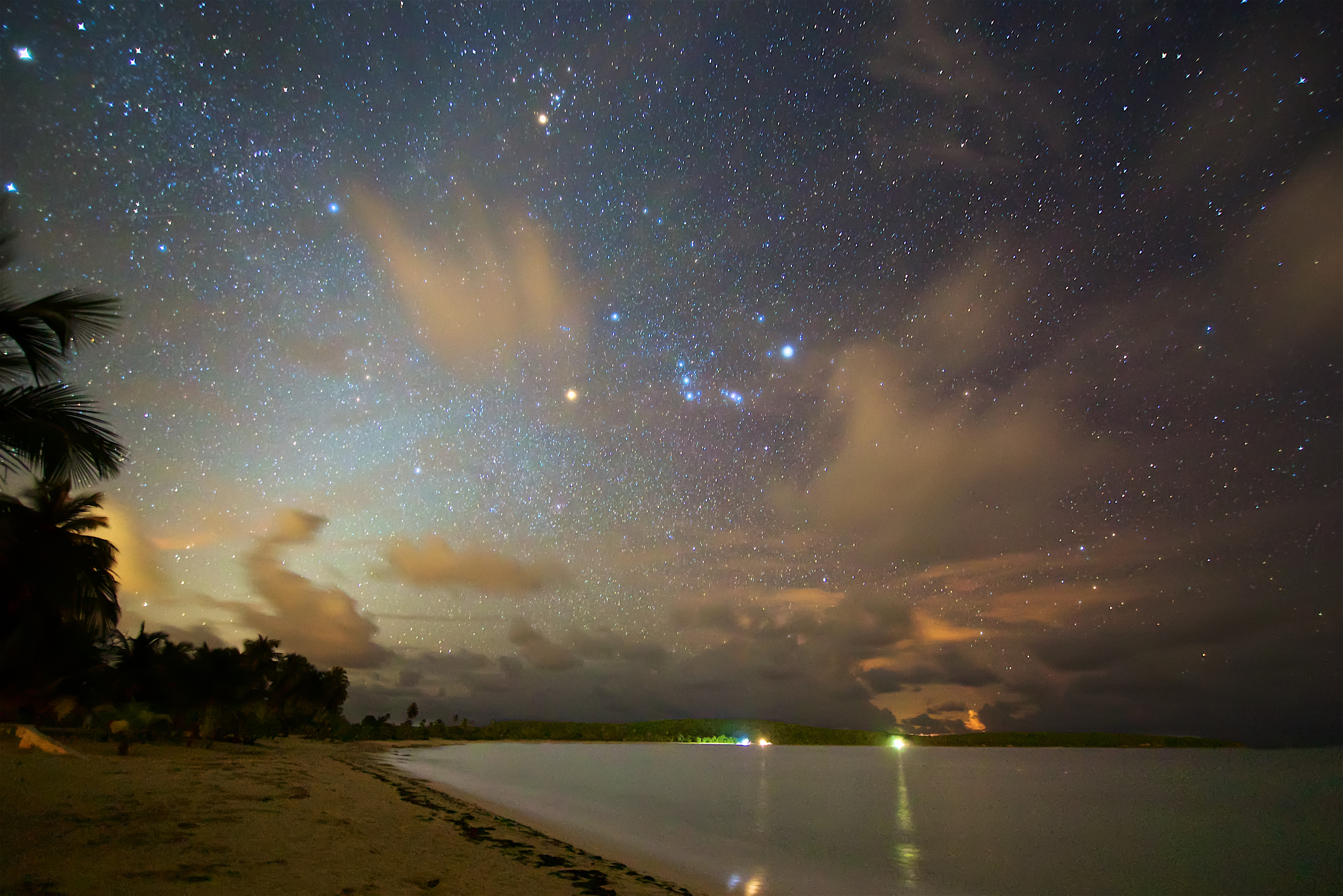 Puerto Real, Vieques, Puerto Rico